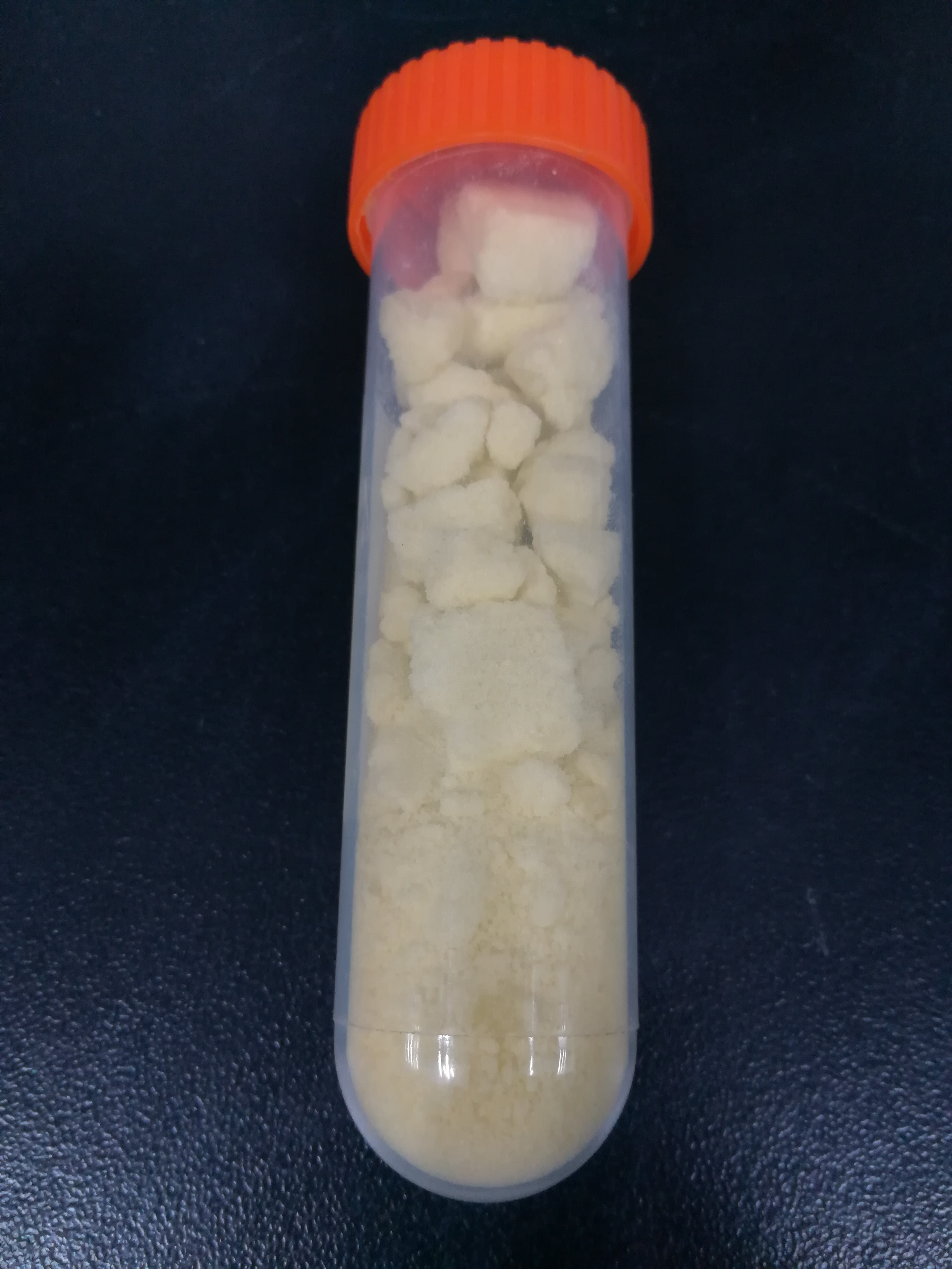 50g的硝酸钬